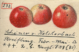 Apfelsorte Ruhm aus Kelsterbach (hier als Schöner v. Kelsterbach bezeichnet)